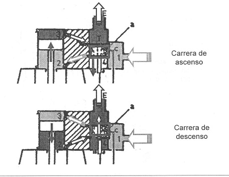 Carreras martillo de vapor de doble efecto